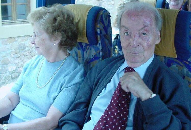 Valentín García Yebra con su esposa.